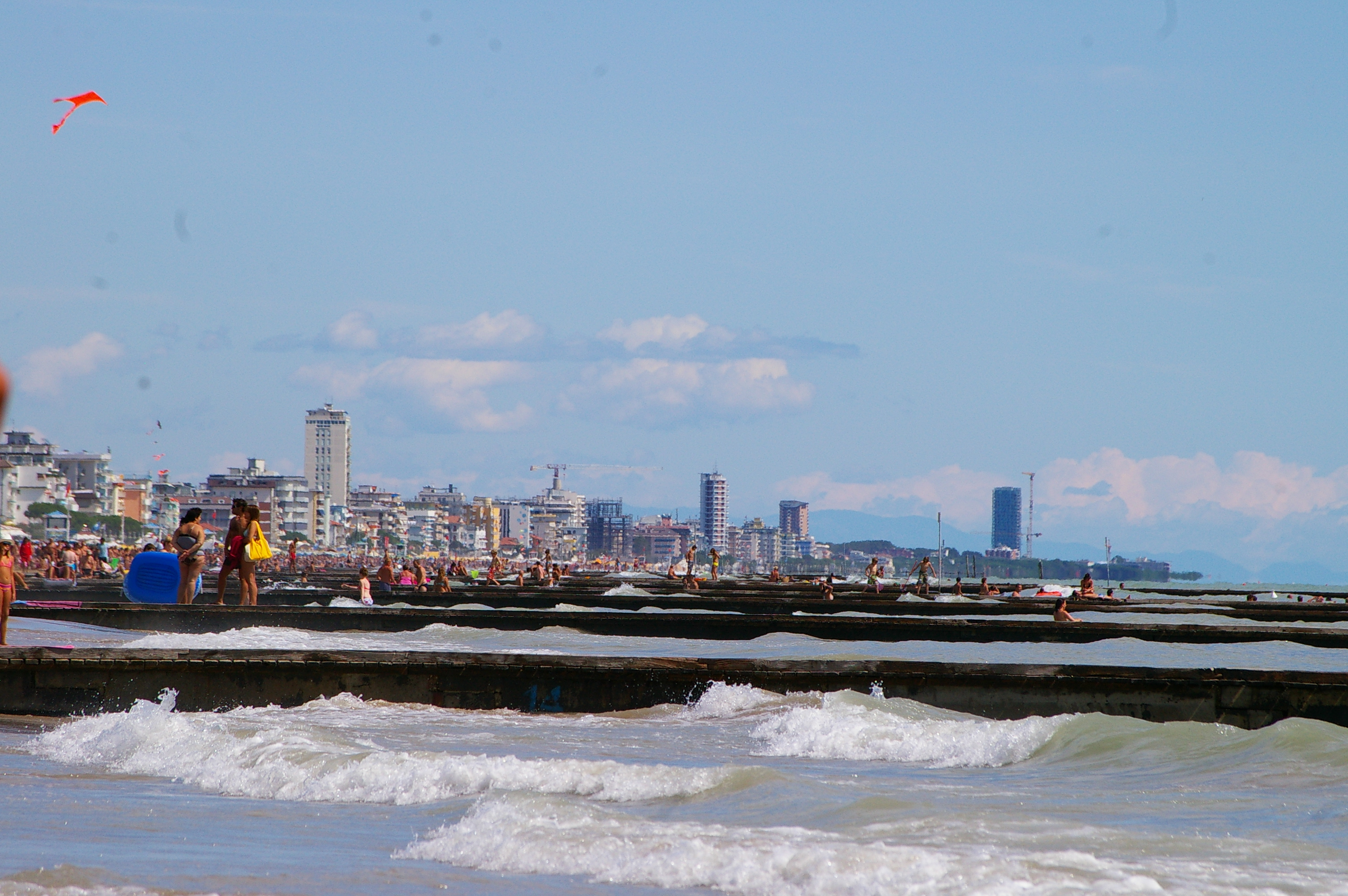 Jesolo, Strand und Hotels